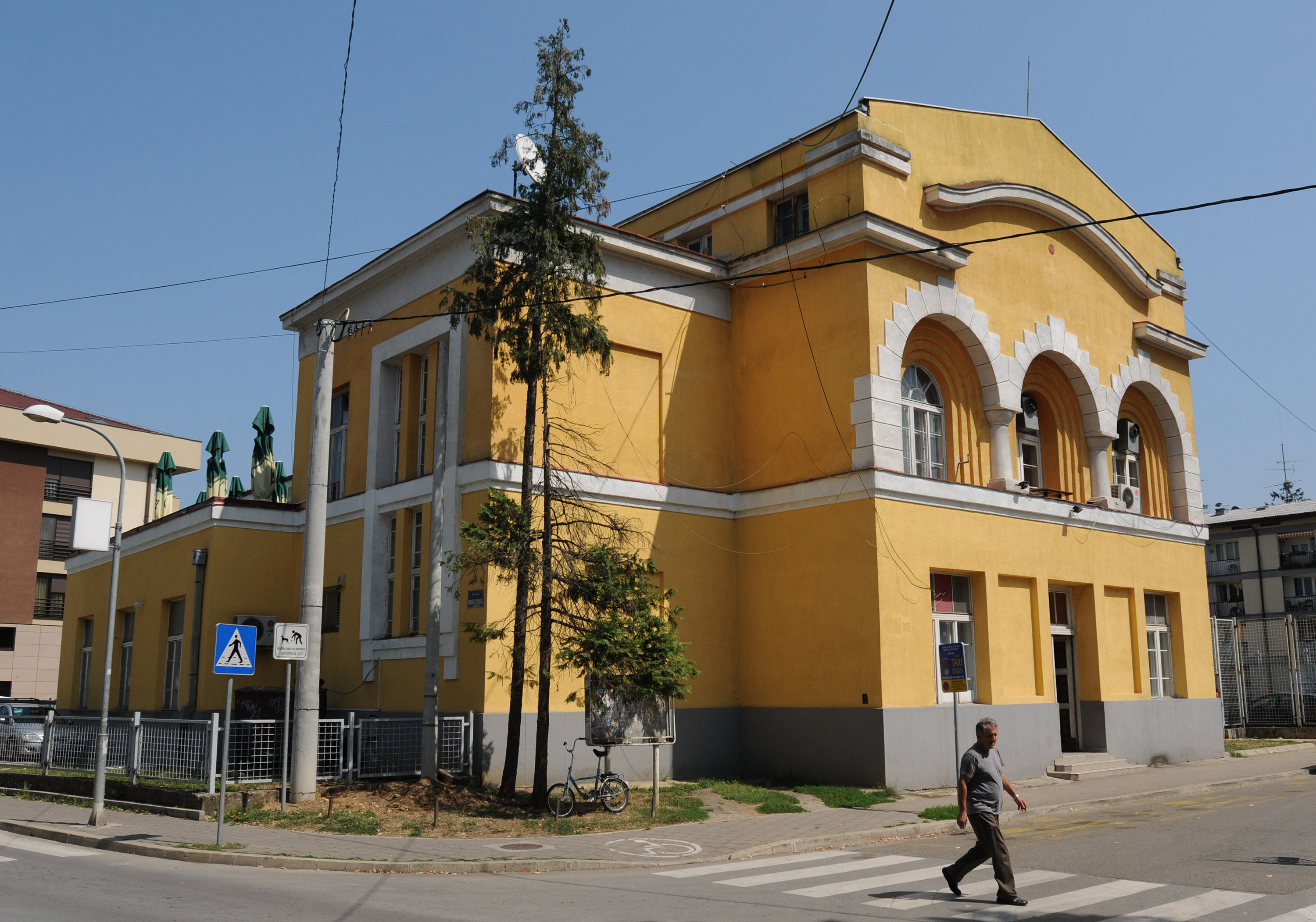 Banja Luka sokolska kuca - sokolski dom ul Marije Bursac Сликава е подигната во рамките на проектот „По трагата на душата 2015“.